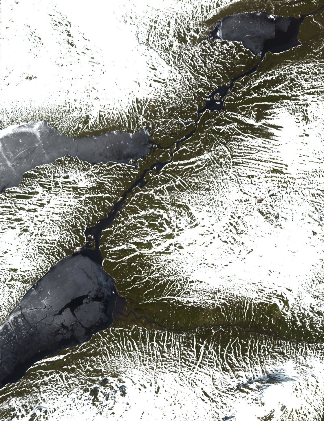 Le 28 mai 2002. Photo des débouchés des lacs Sallohaure et (en bas) Vastenjaure (parc national de Padjellanta), dont les glaces sont en pleine débâcle. Le bord haut de la photo est orientée au nord-est (et non au nord).